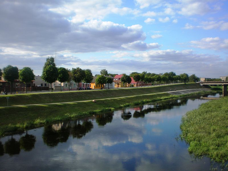 Nevėžis in Kėdaniai